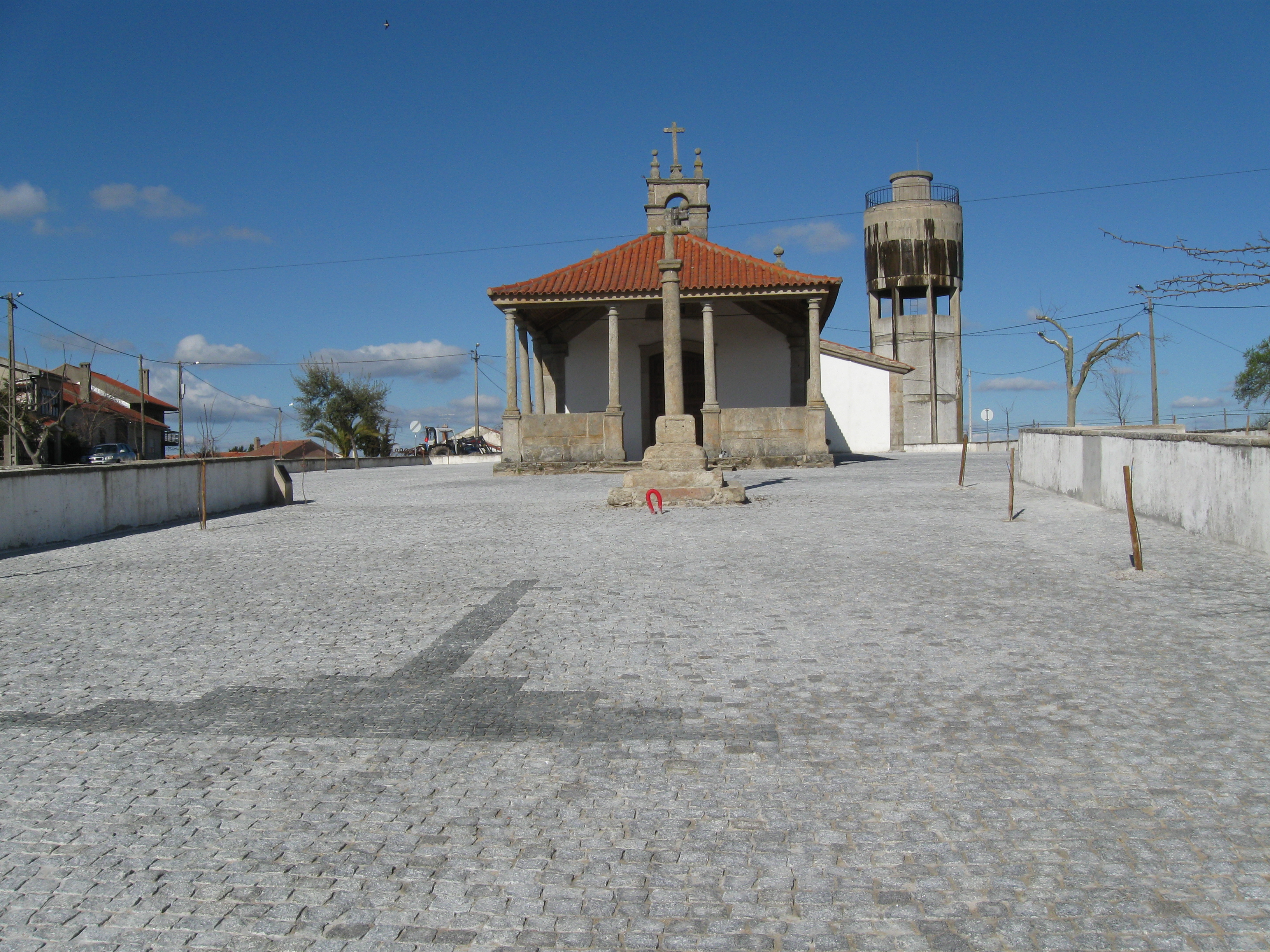 Capela com imagens de arte popular interessantes